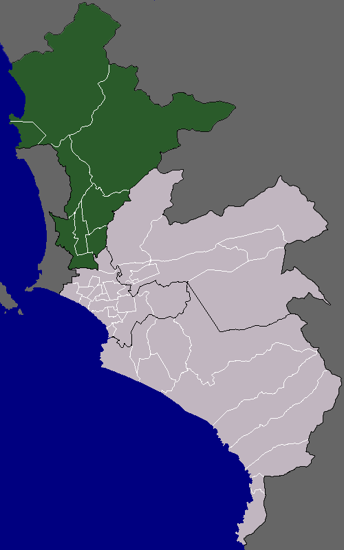 Mapa del Cono Norte de Lima